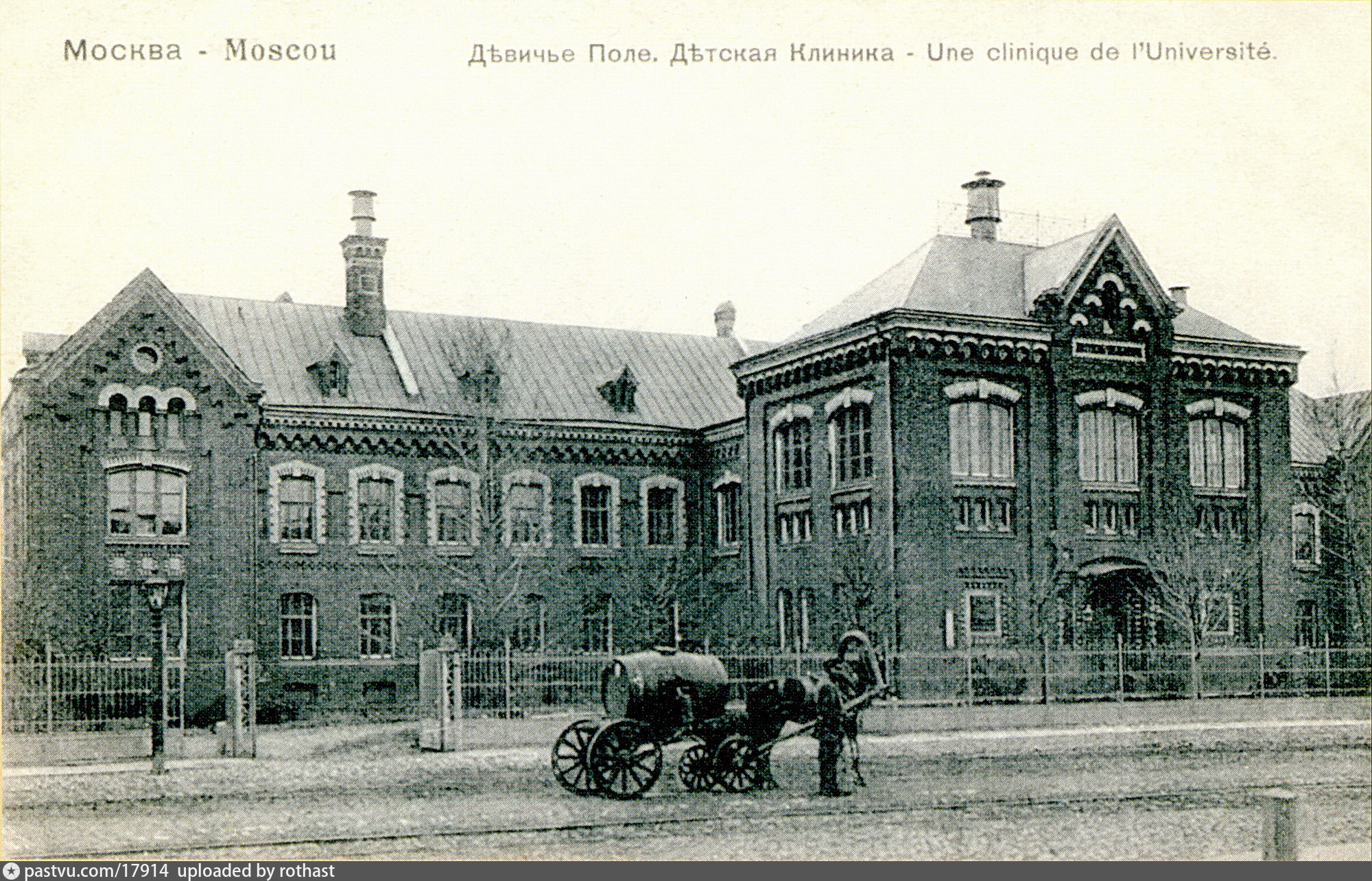 Здание клиники детских болезней на Девичьем поле, построенное в 1891 году по проекту архитектора К. М. Быковским на пожертвования М. А. Хлудова. // Большая Пироговская 19